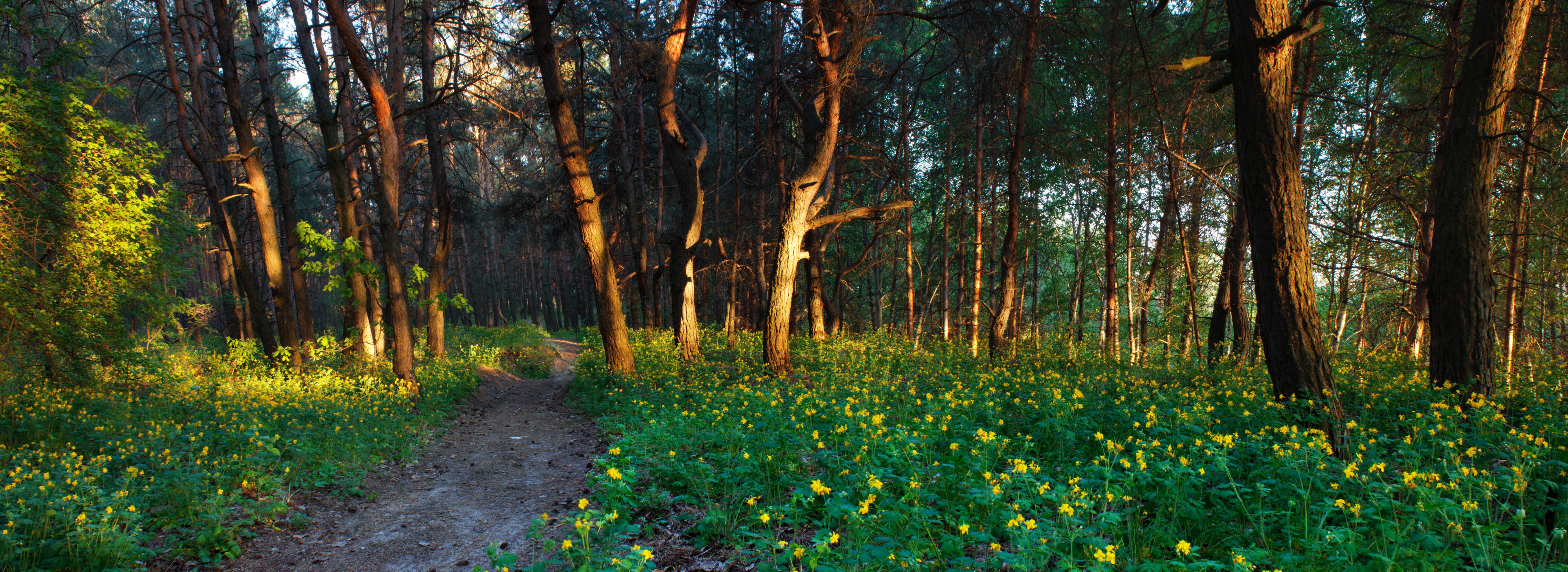 Сосновый бор на левом берегу Печенежского водохранилища.